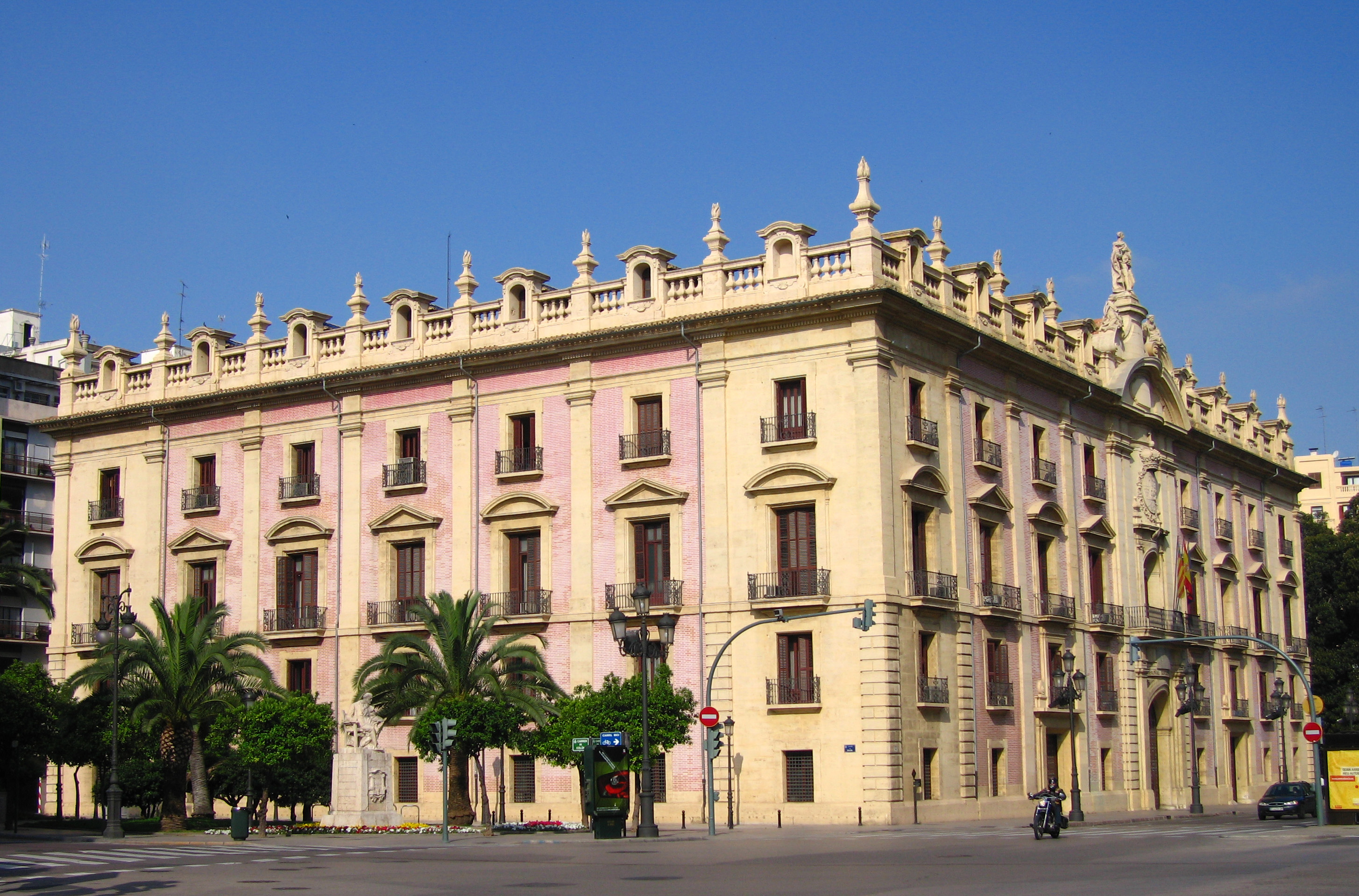 palau de justicia valència